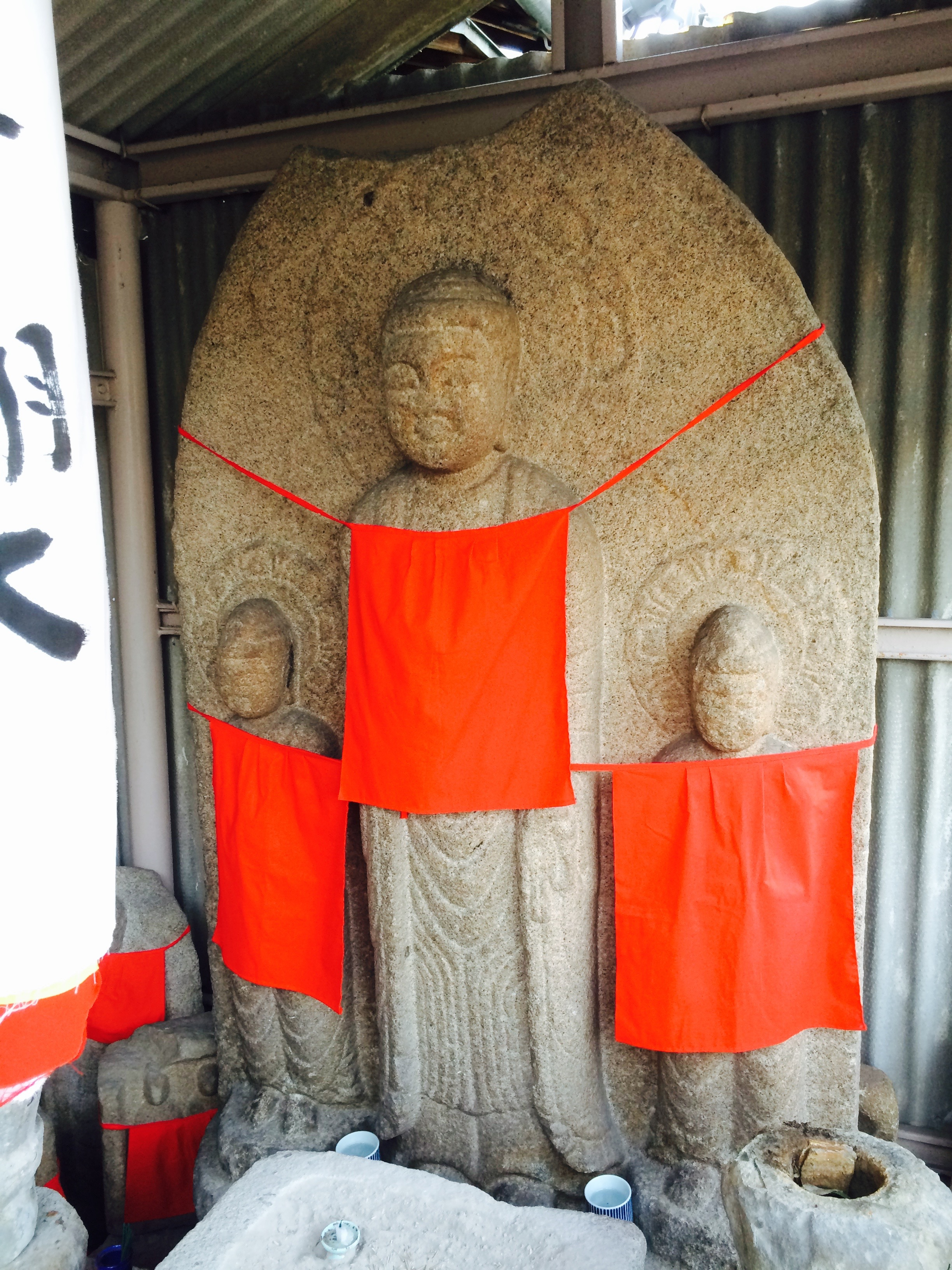 奈良市京終地蔵尊本尊阿弥陀